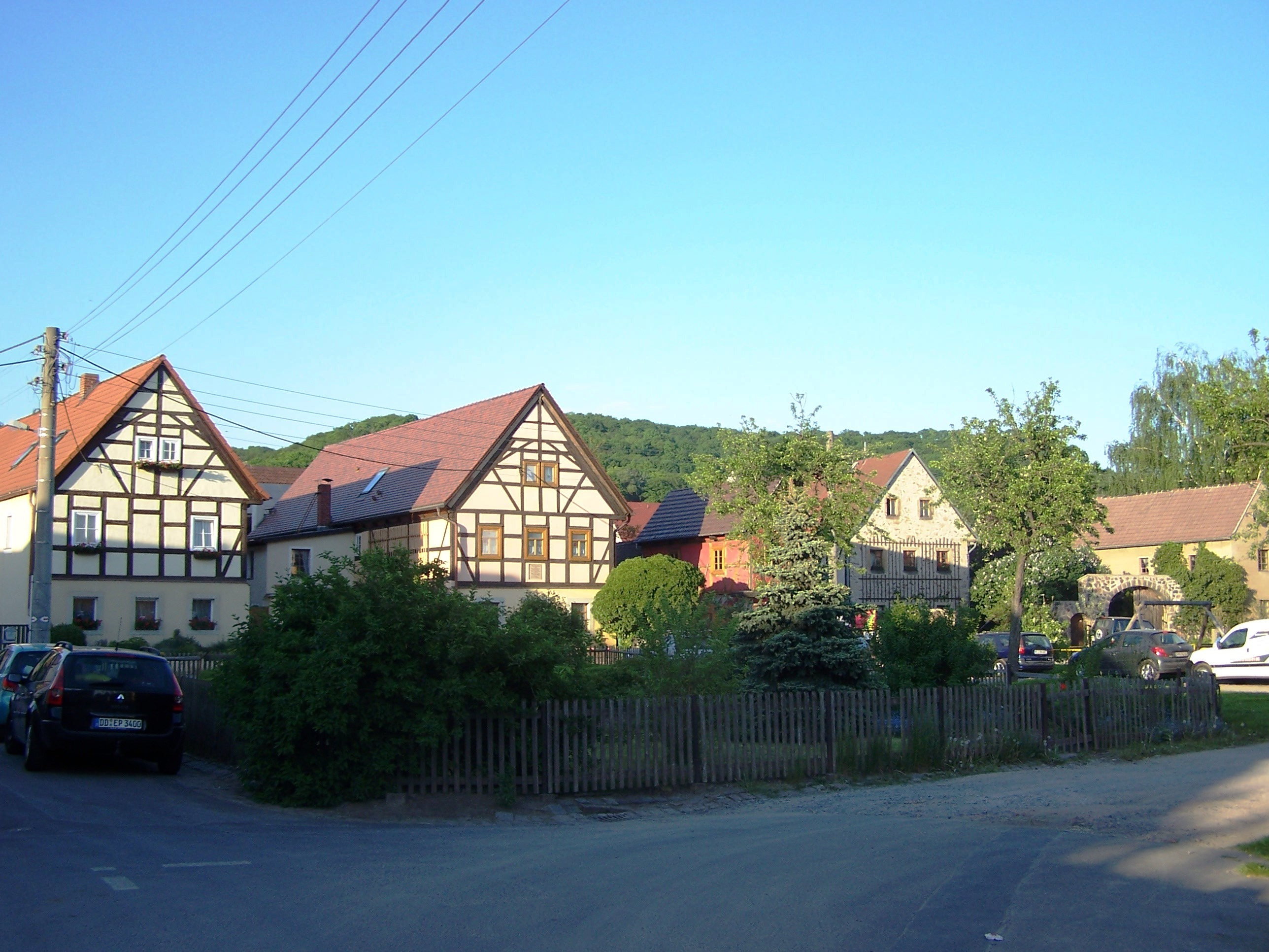 Dorfkern von Zitzschewig, heutiger Stadtteil von Radebeul